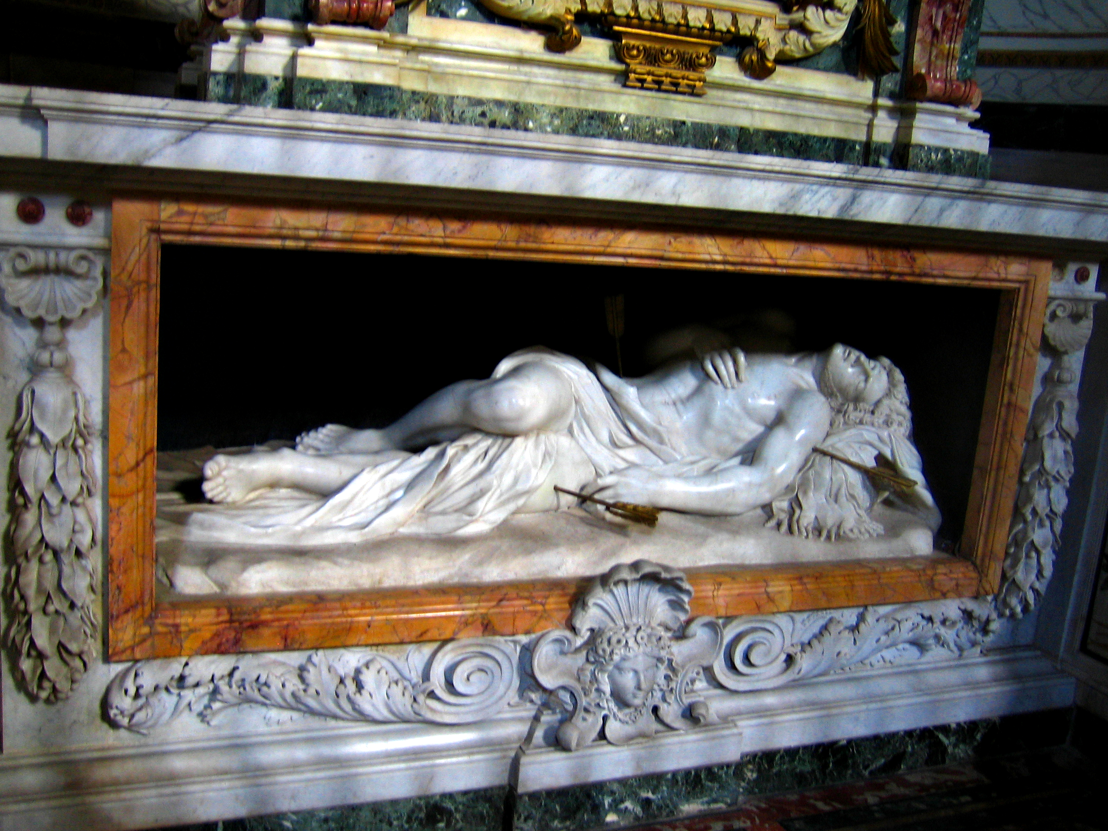 San Sebastiano fuori le Muura, Roma, Italia